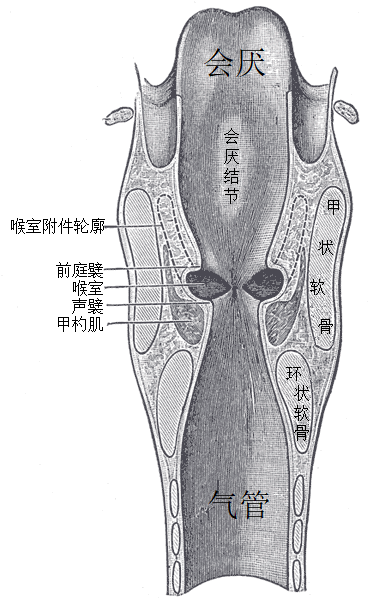 喉的冠状切面和气管的上部